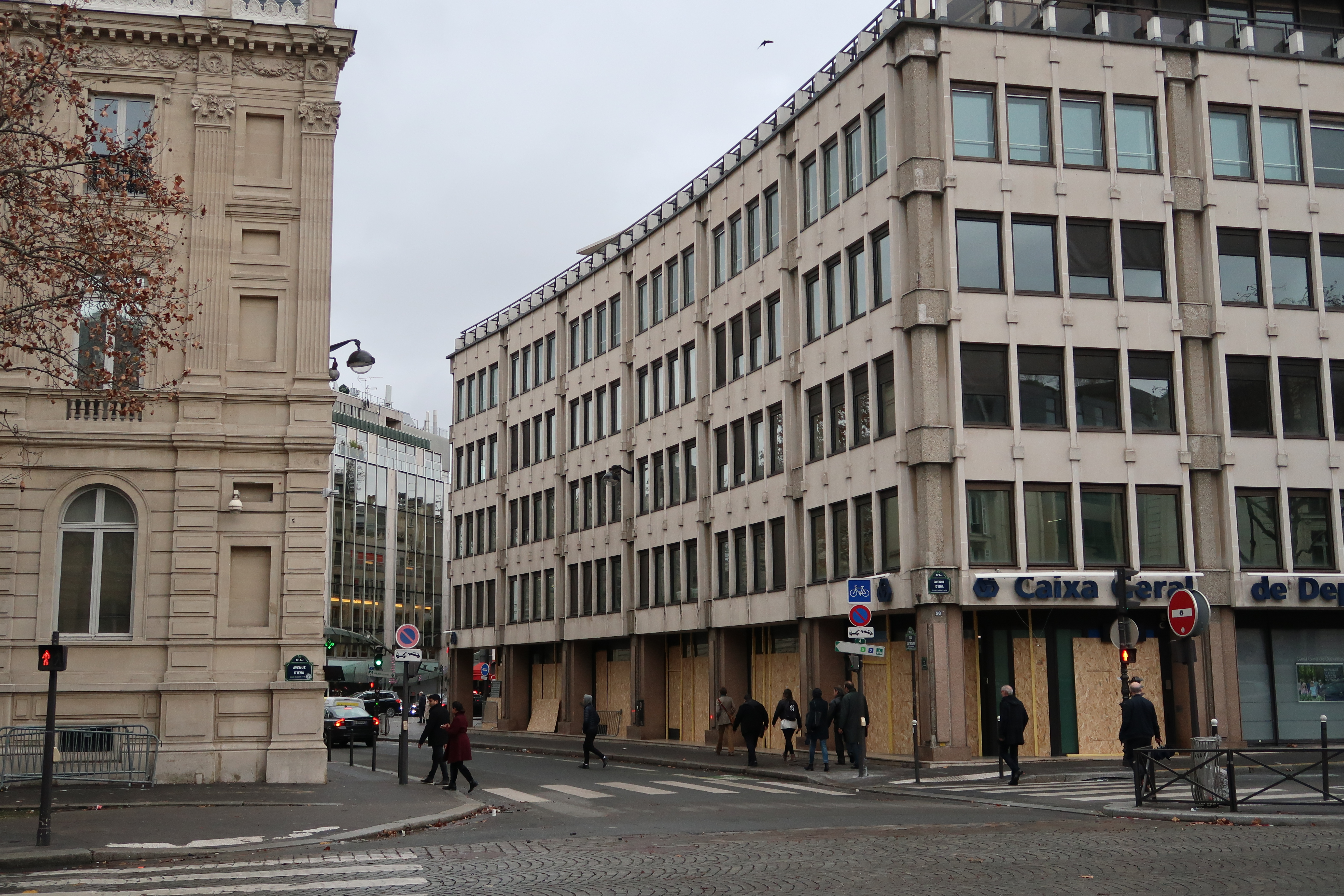 Banque barricadée avenue d'Iéna, près de la place de l'Étoile-Charles-de-Gaulle (Paris, 16e). Photo prise le lendemain de la manifestation du mouvement des Gilets jaunes du 1er décembre 2018.